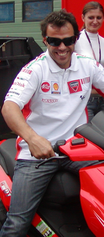 Loris Capirossi, GP Brno 2007